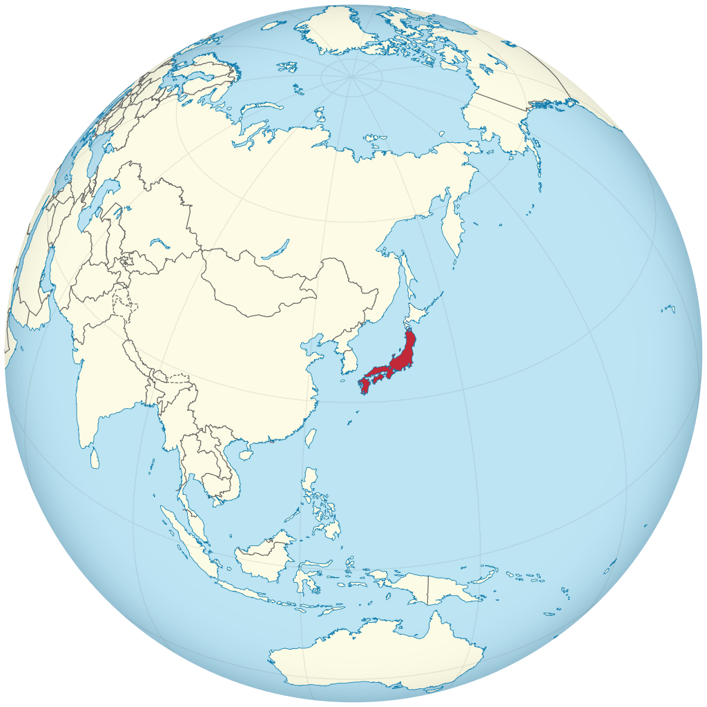 도쿠가와 막부는 홋카이도를 제외한 나머지 3개의 주요 도서지역에 대해 통치권을 발휘하였고 홋카이도(아이누, 에조)는 북방 다이묘로 하여금 간접적인 영향력을 행사하였다. 또한 류큐국에 대해서는 조공관계를 유지하고 일본 영역에 포함하지 않았고 이것은 류큐국의 독립성에 확고한 의미를 부여하였다. 훗날 일본 제국의 성립 이후 각각 병합되었는데 홋카이도는 1868년에 하코다테 전쟁으로, 류큐는 1875년 제1차 류큐처분(류큐국왕 다이묘로 강등)과 1879년 제2차 류큐처분(오키나와 현 설치)으로 병합되었다.